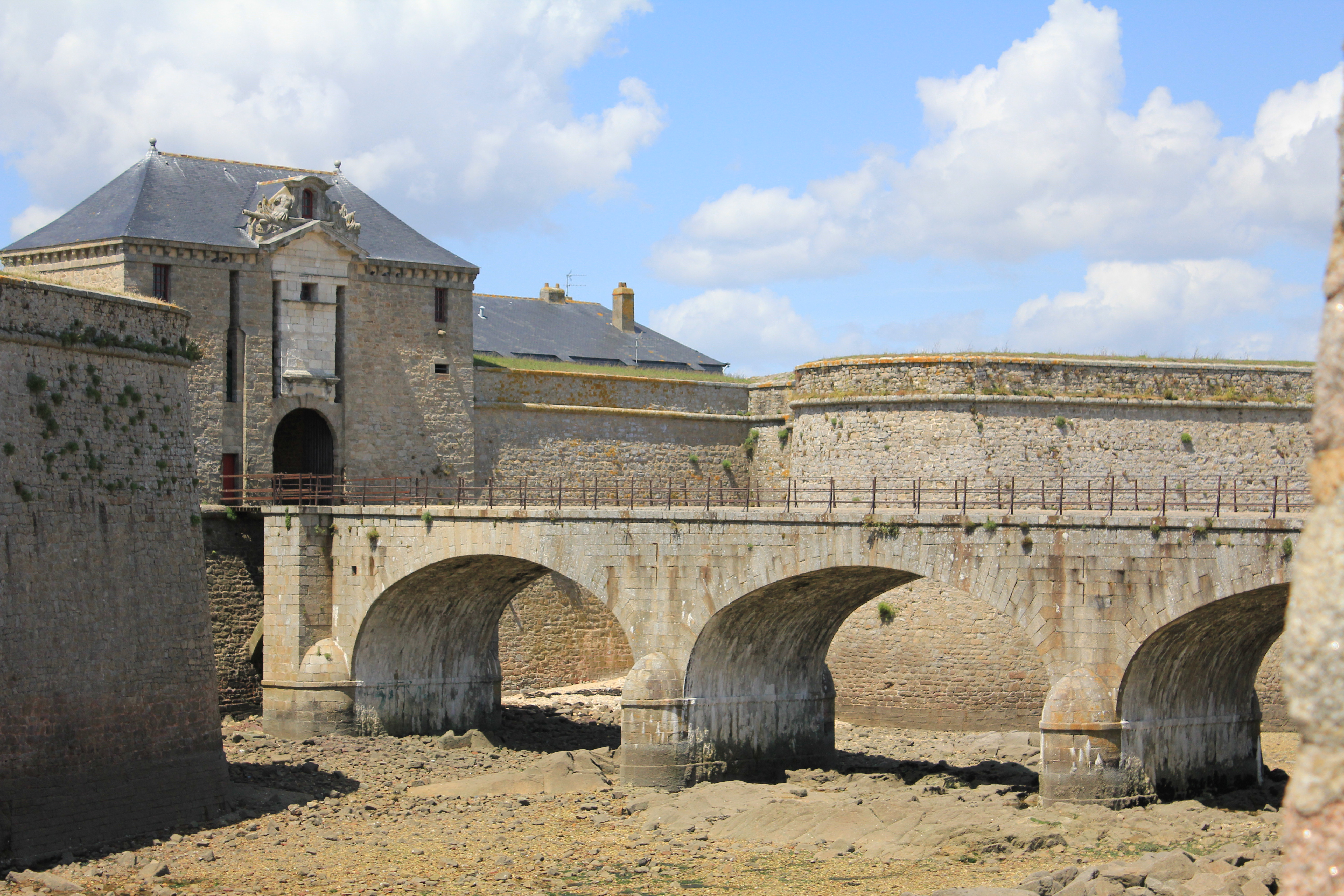 Citadelle à Port-Louis, Morbihan, France